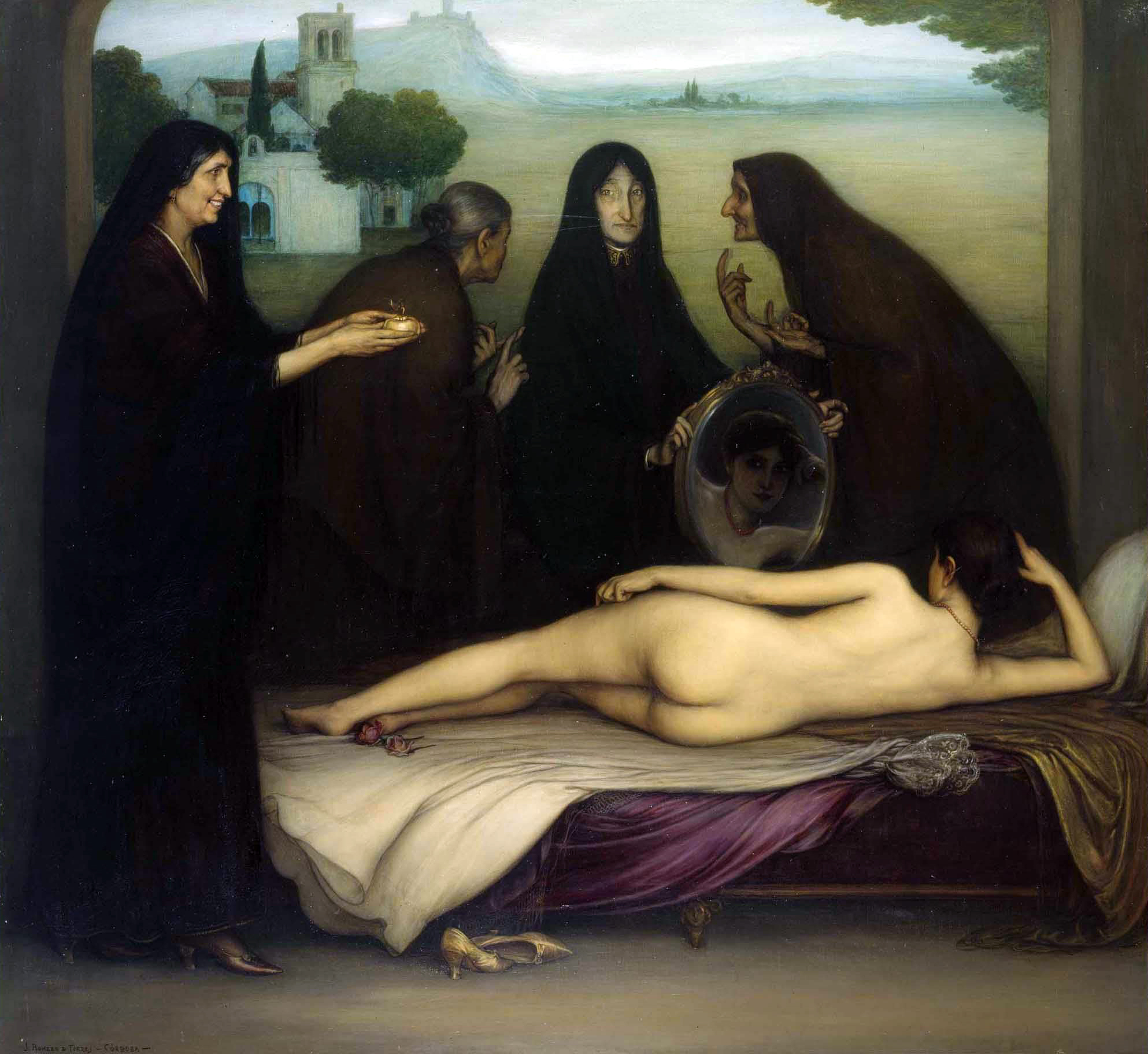 El pecado. 1913. Óleo y temple sobre lienzo. 153 x 195 cm. Museo Julio Romero de Torres, Córdoba, (España).